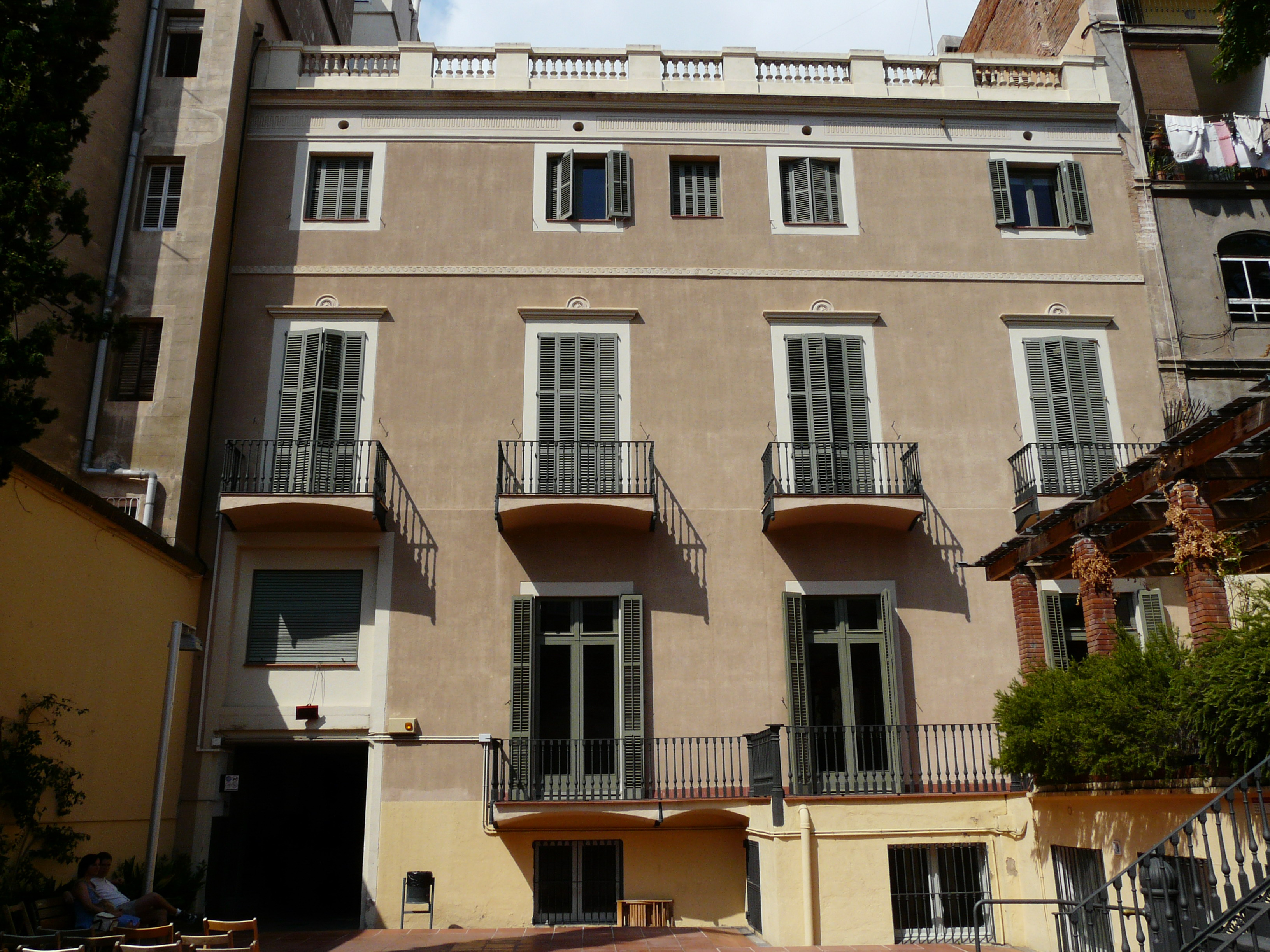 Casa Elizalde (Barcelona)